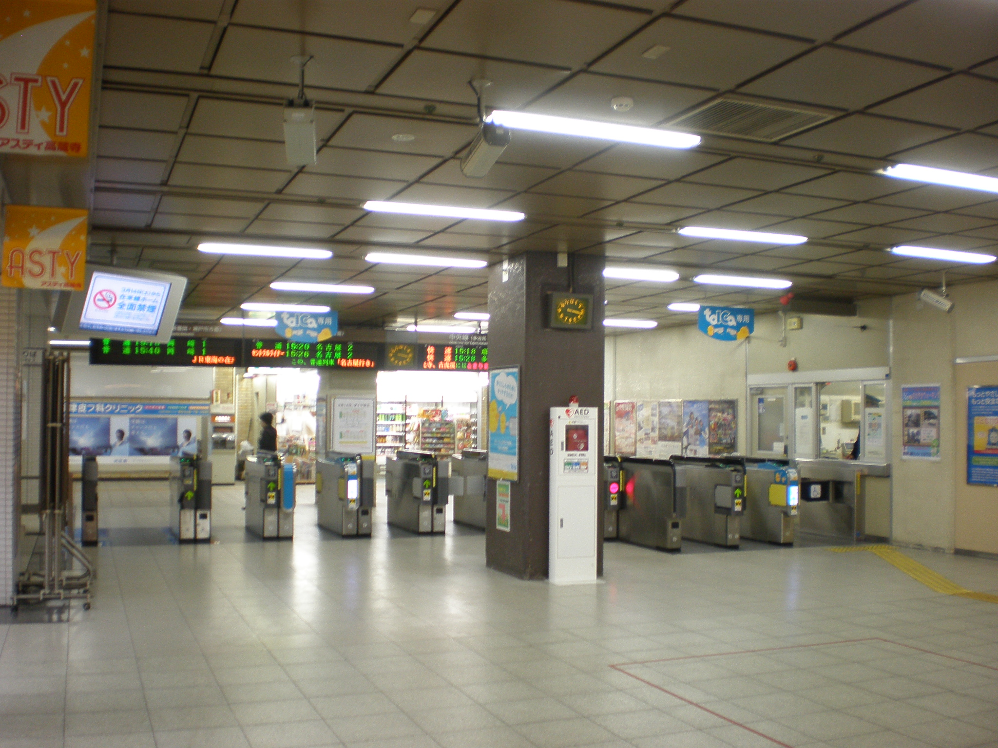 愛知県春日井市にある高蔵寺駅の改札口